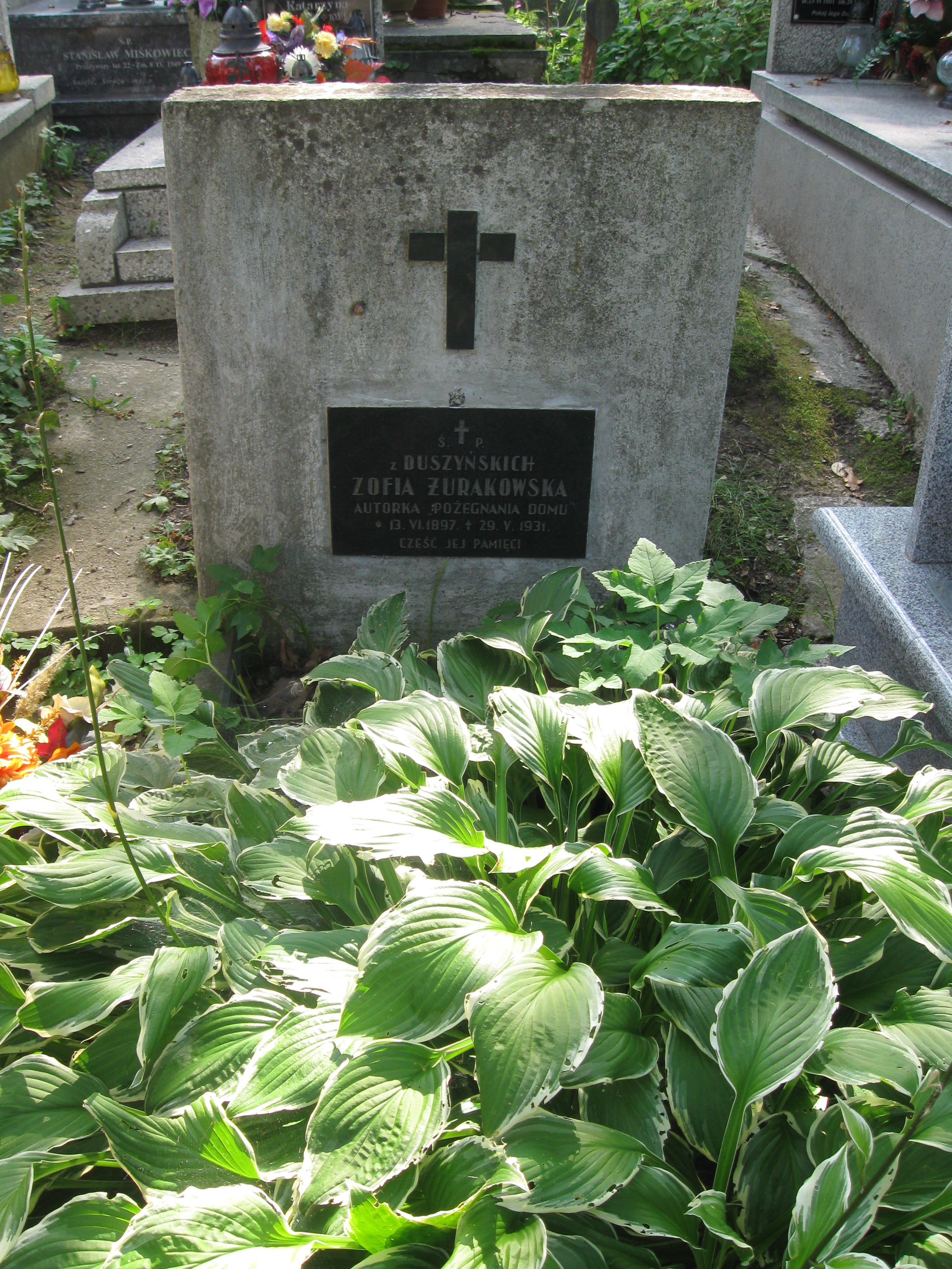 Nagrobek pisarki Zofii Żurakowskiej na Starym Cmentarzu w Rabce-Zdroju.